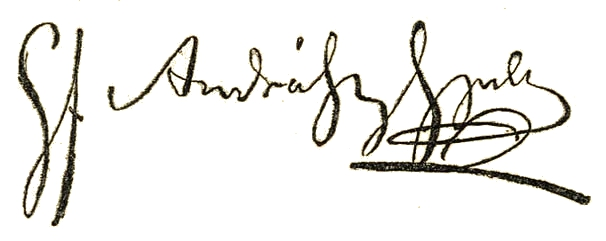 gróf Andrássy Gyula (1823–1890) aláírása